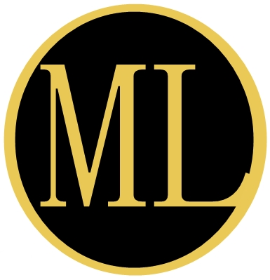 la noche de ml